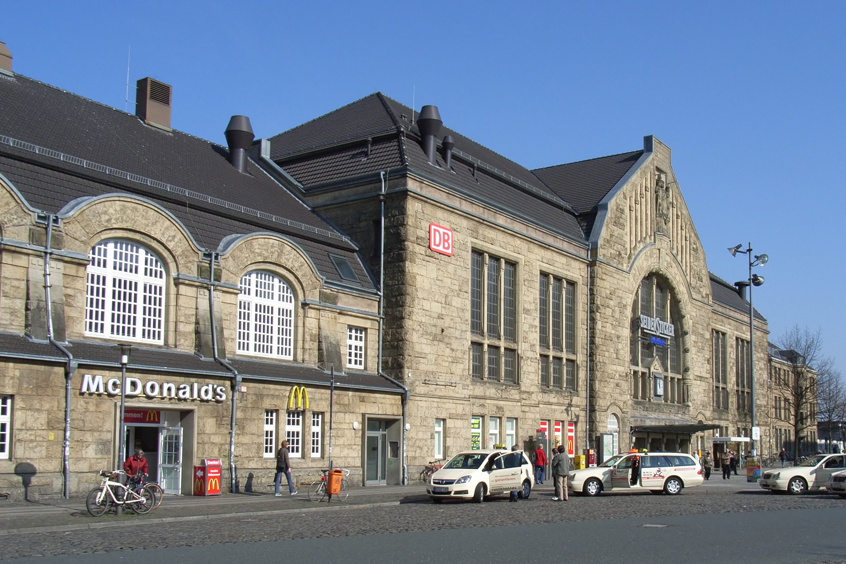 Bielefeld, Deutschland: Hauptbahnhof.